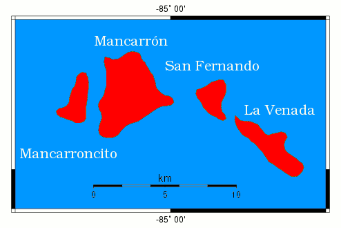 îles Solentiname. Carte du domaine public créée depuis le site de création de cartes en ligne